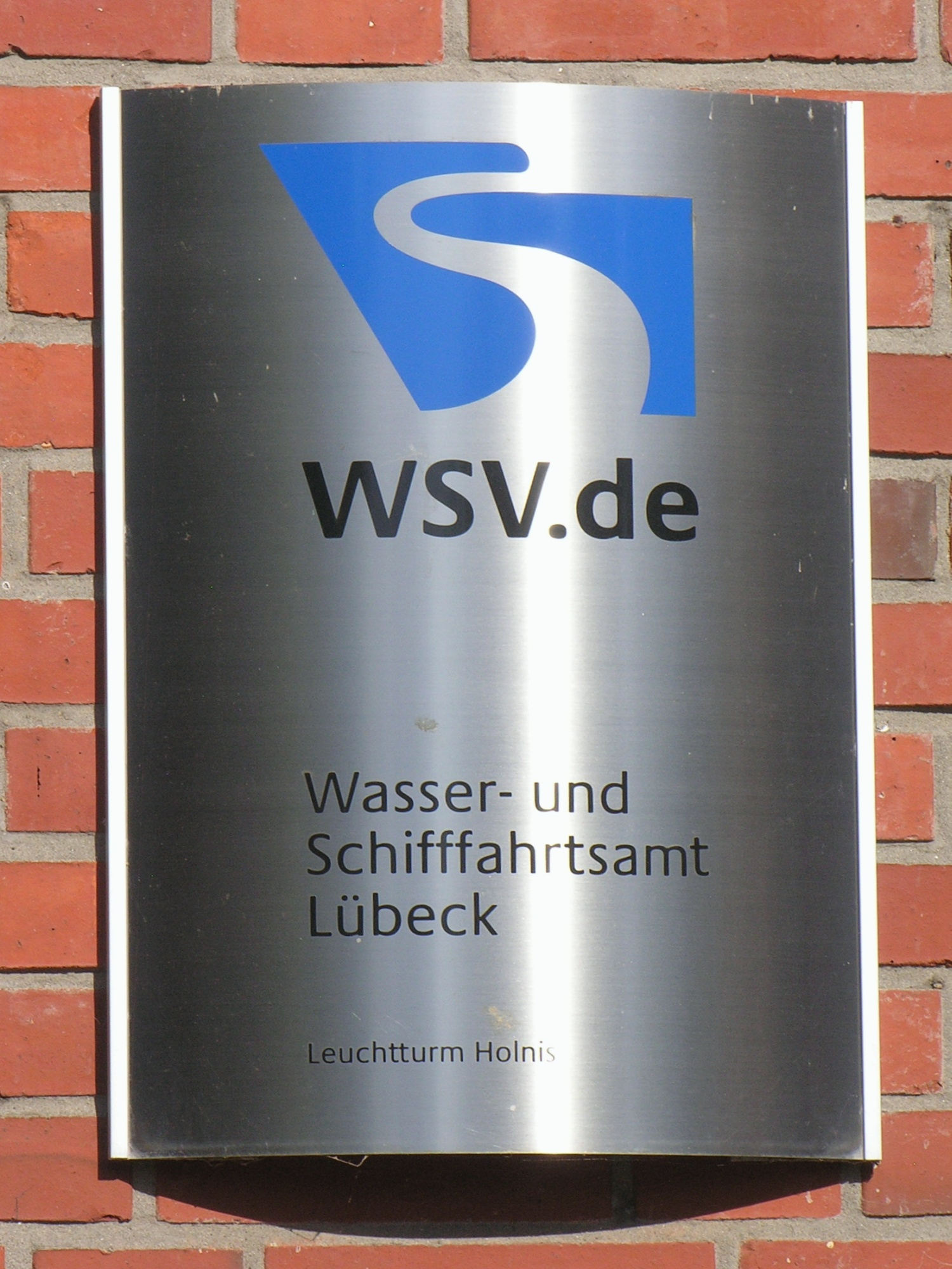 Leuchtturm Holnis: Kennzeichnung der WSV Lübeck am Maschinenhaus - Foto 2012 Wolfgang Pehlemann Steinberg DSCN0314